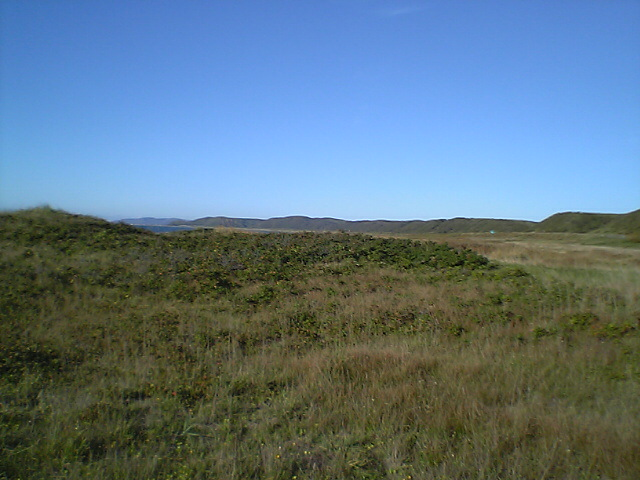 Sarobetsu Plain in Hokkaido, Japan